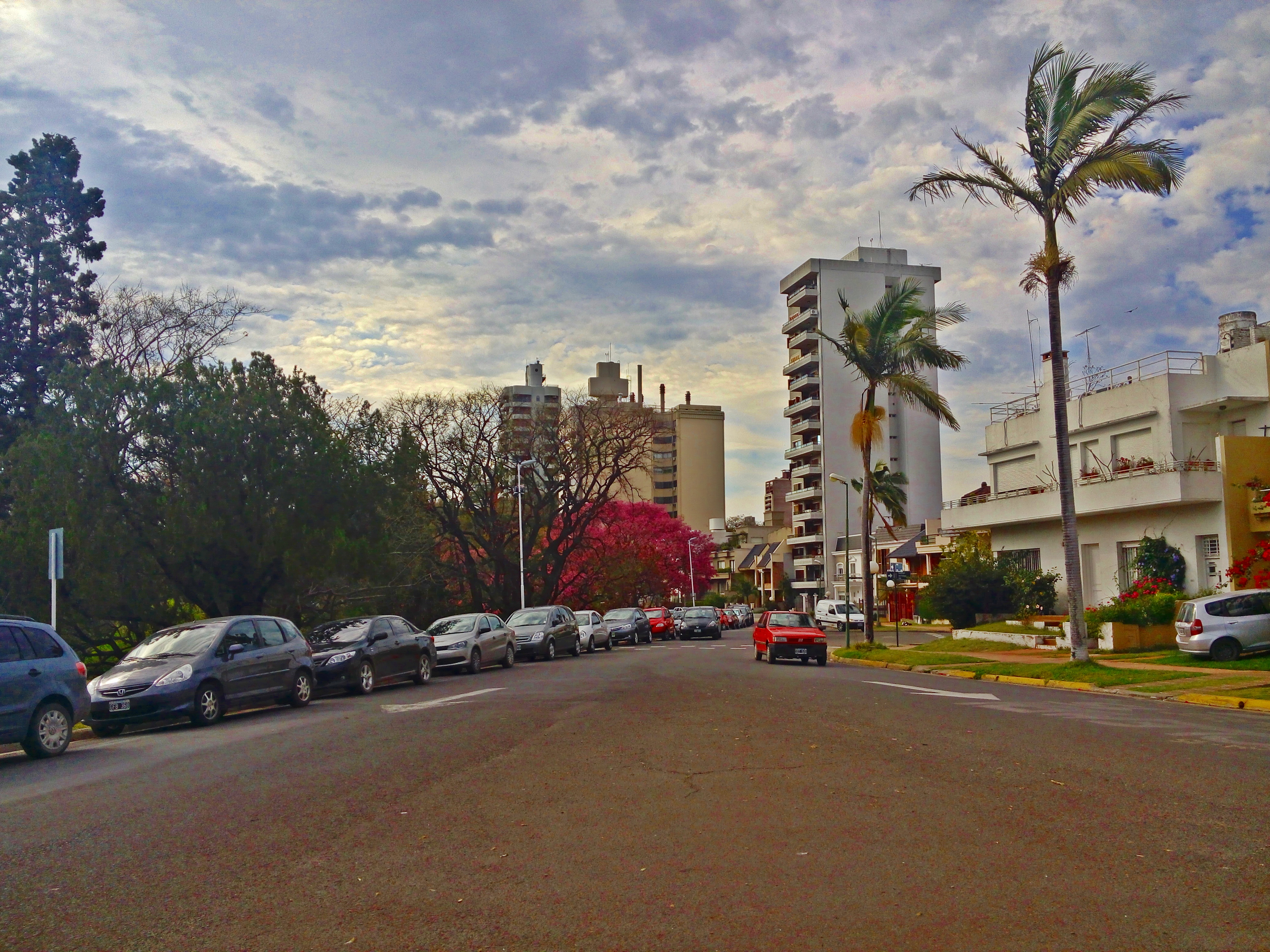 Calle Martiniano Leguizamón de la ciudad de Paraná, Entre Ríos, Argentina.